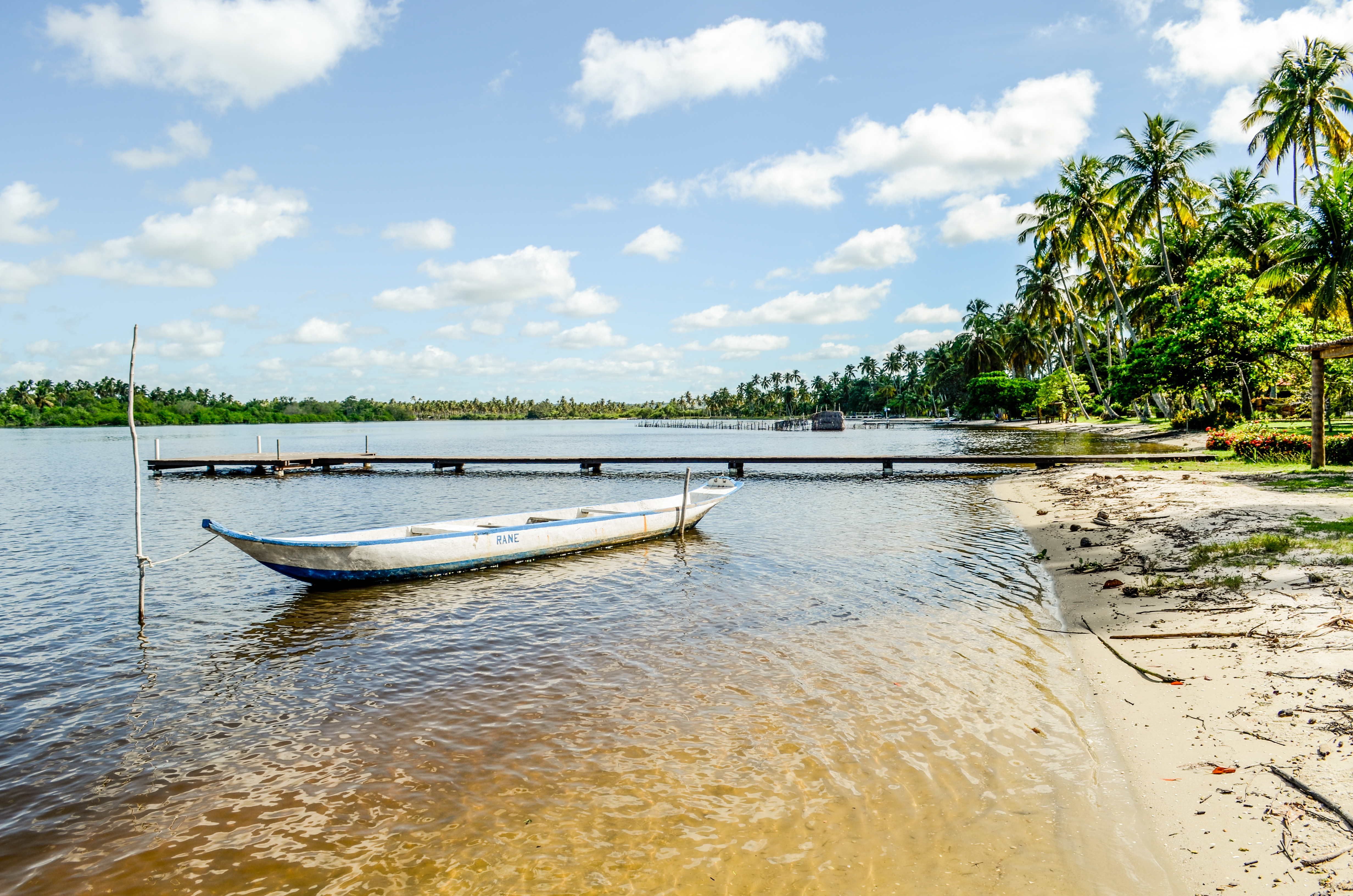 Canoa na Lagoa Mundaú.